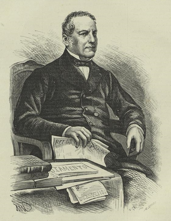 O Conselheiro José Tomás Nabuco de Araújo.